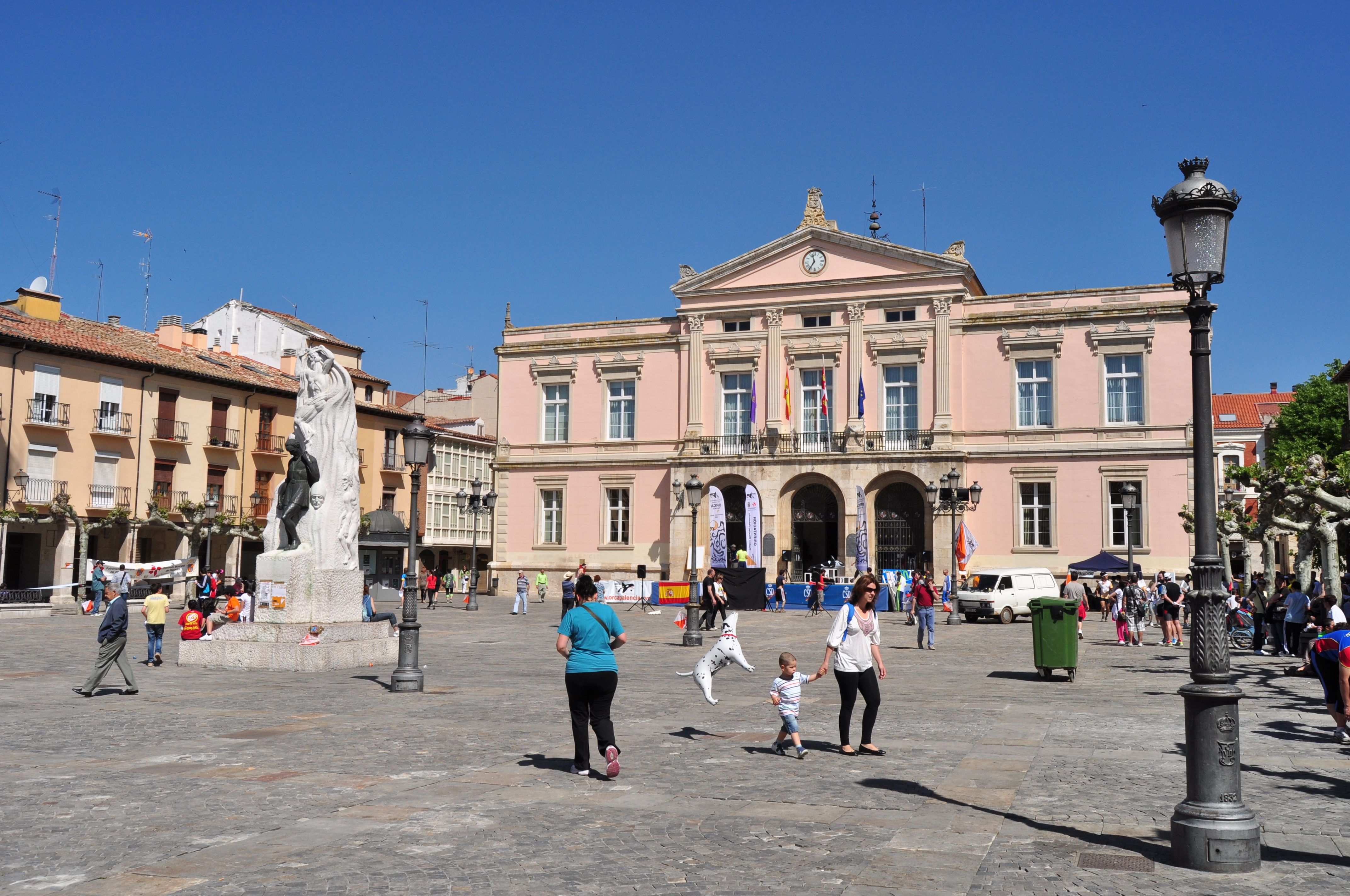 Palencia Capital - 013